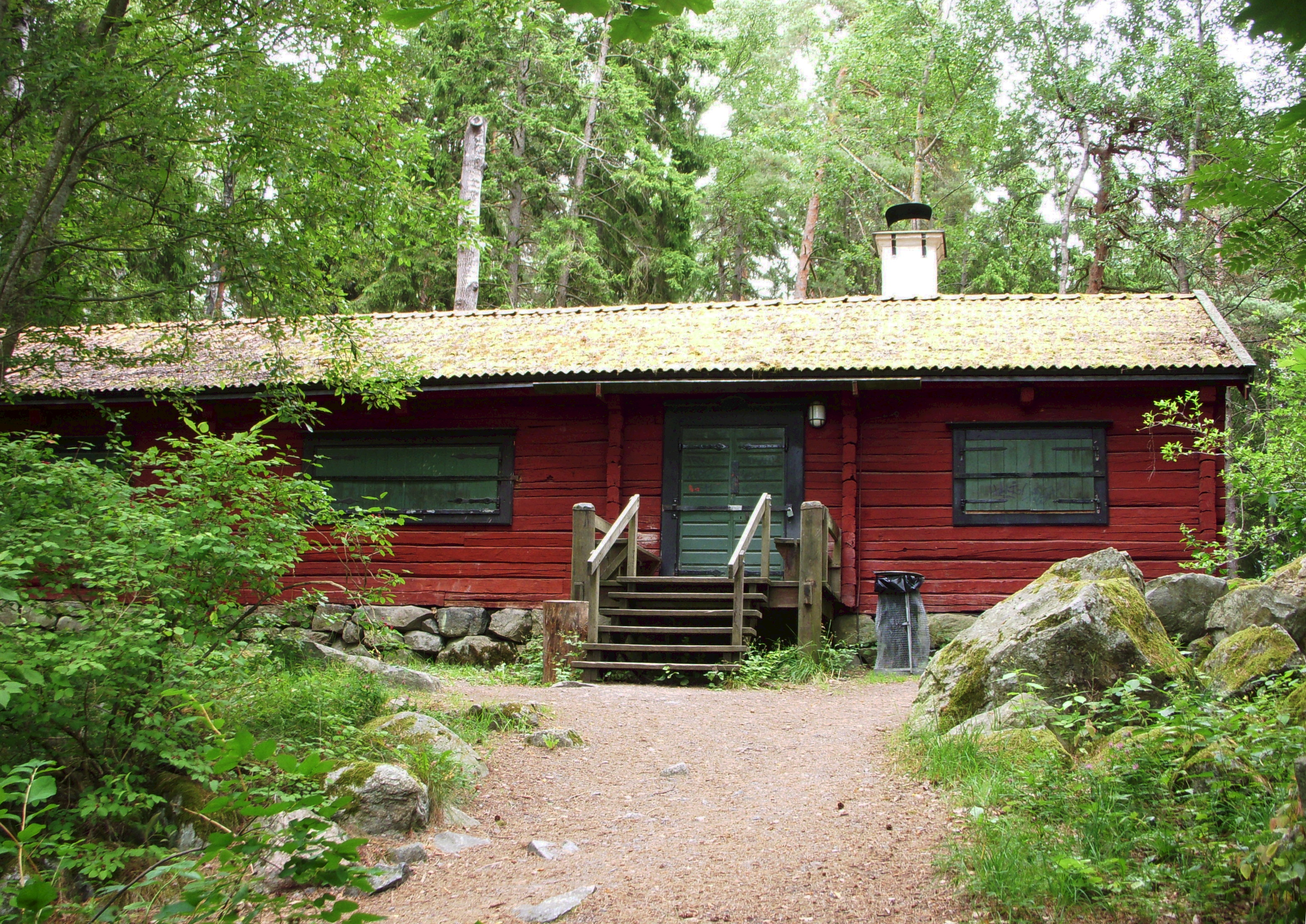 Torpet Lugnet vid Judarn, Bromma